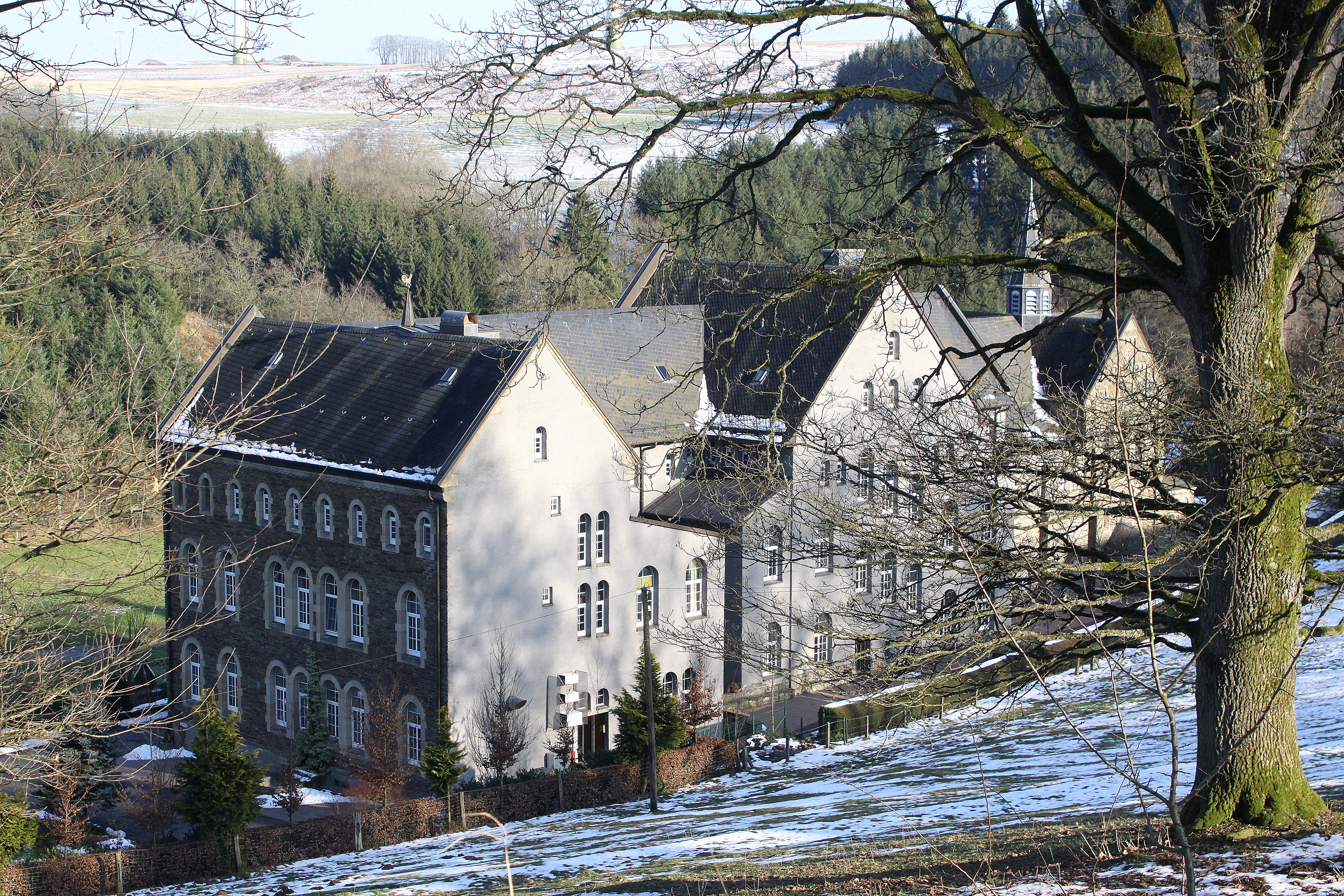 D'Klouschter vun hanne gesinn